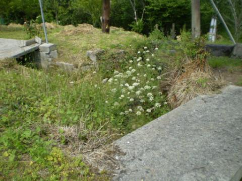 O Muíño de Gervasio en Xove.